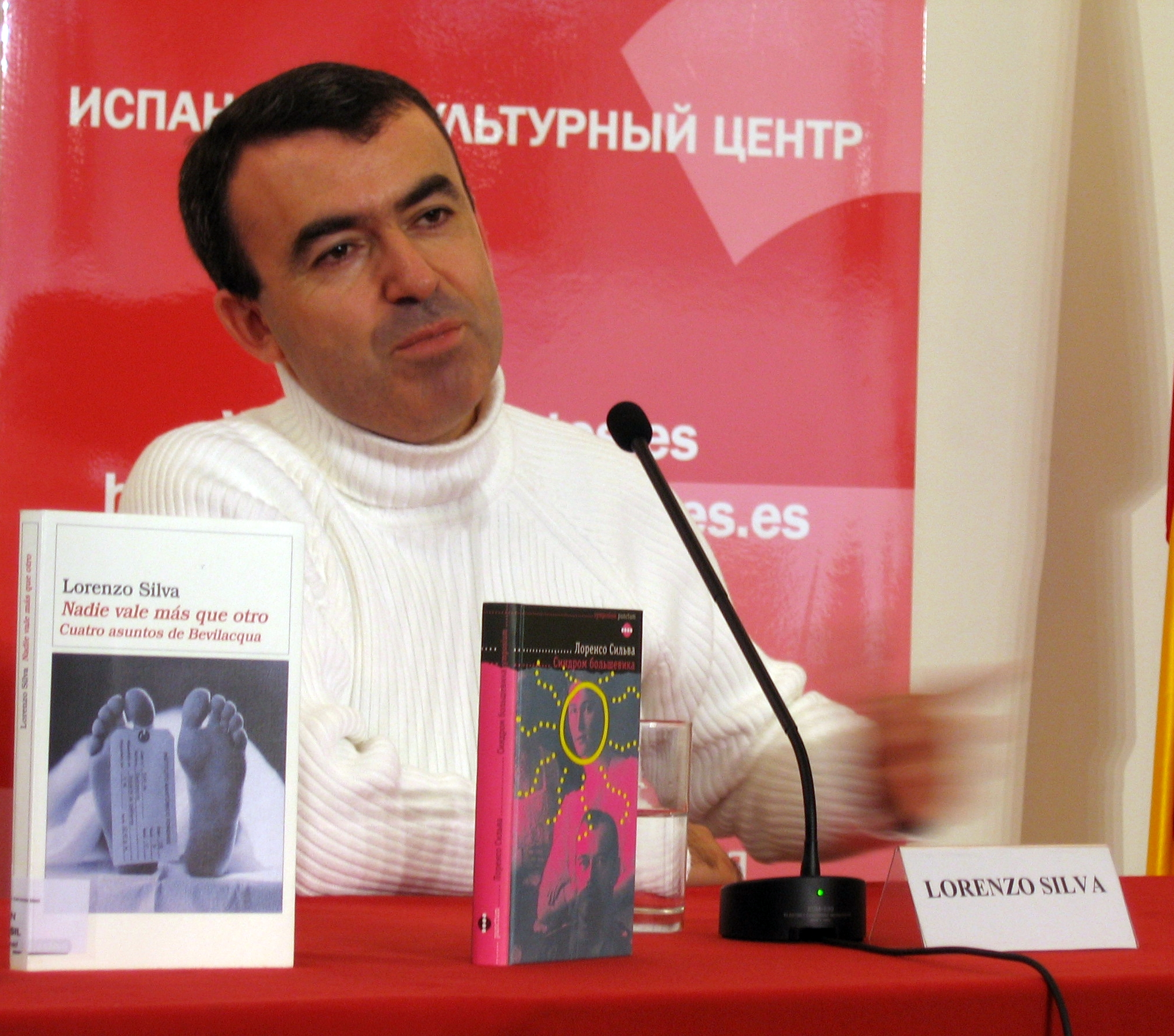 Выступление Лоренсо Сильвы в Институте Сервантеса г. Москвы